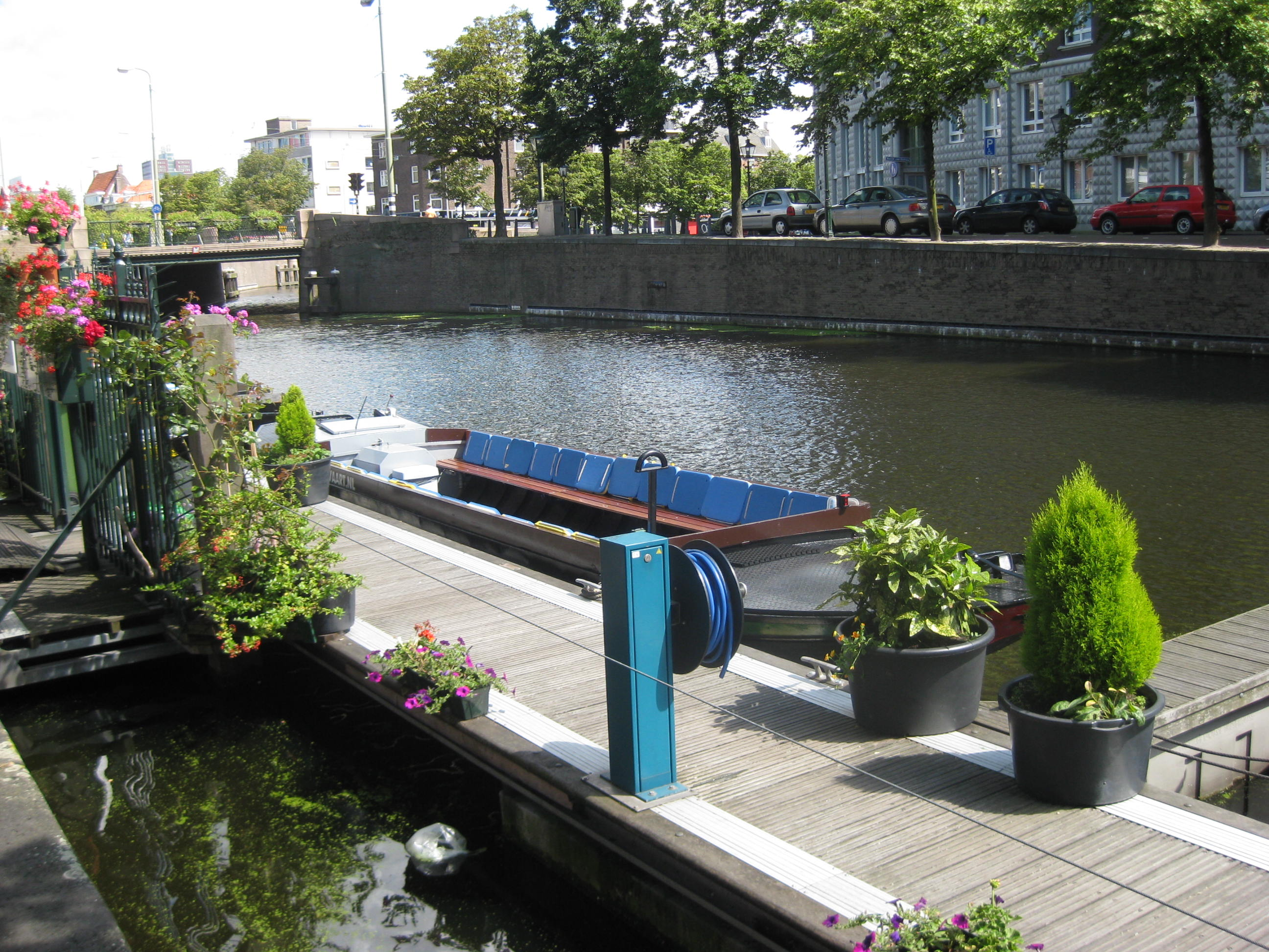 Rondvaartboot aan de Bierkade in Den Haag, Nederland